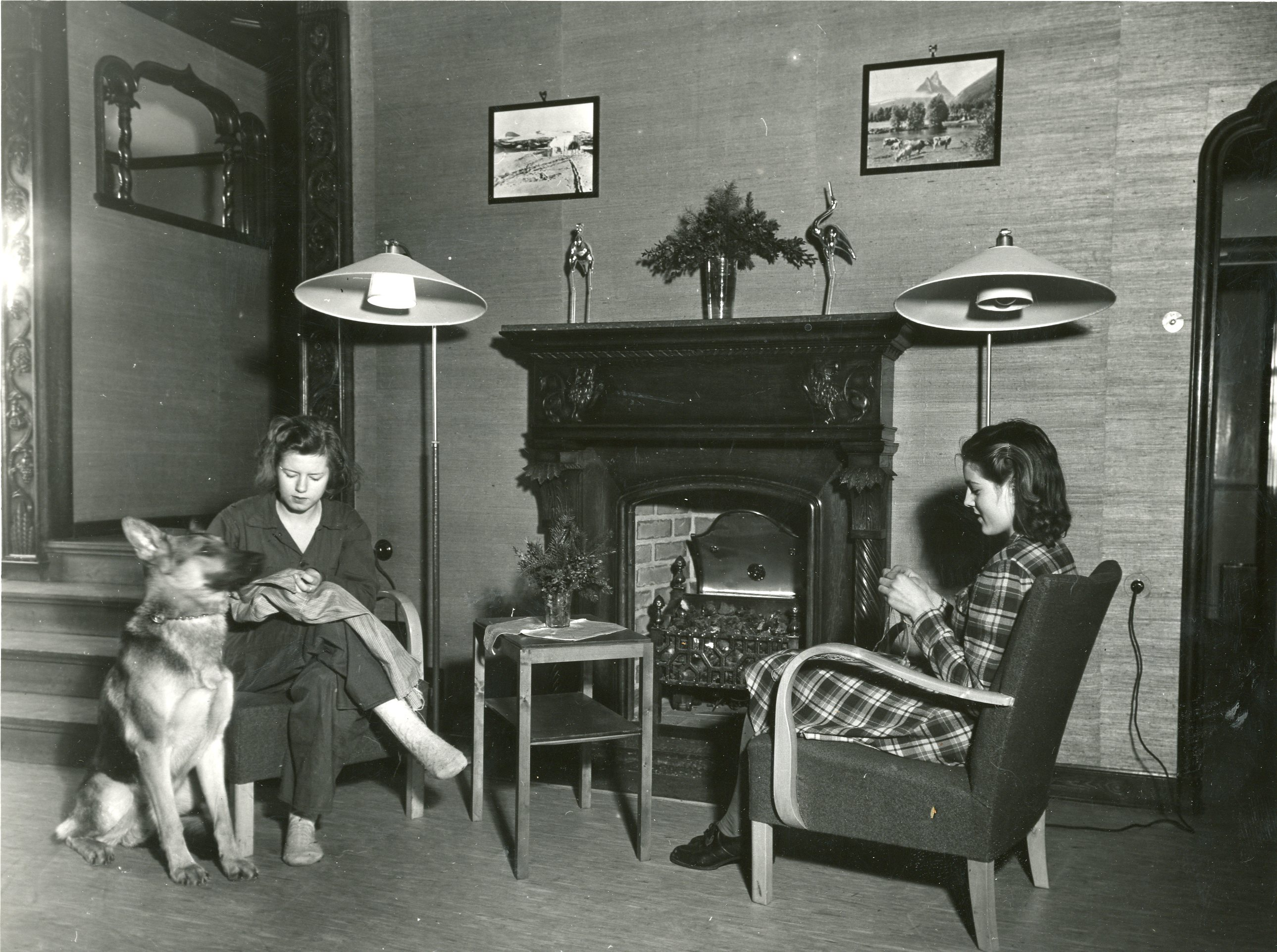 AMERIKA-HJELPEN TIL NORSKE FLYKTNINGER Av de 100,000 dollars som amerikanske borgere har gitt til beste for norske flyktninger i Sverige, har komiteen for Amerika-hjelpen anvendt et beløp til innkjøp av en vakker villa i Stocksund utenfor Stockholm, som hjem for unge piker. Huset inneholder store salonger, bibliotek, spisesal, hall og forsamlingssal og gir plass til innkvartering av 35 piker med betjening. Bildet viser en idyll fra hallen med den dekorative peis. To av de unge pikene bruker fritiden til strikking og håndsøm. Stockholm 20.3.45 RA/PA-1209/Uc/72/3/S 5648